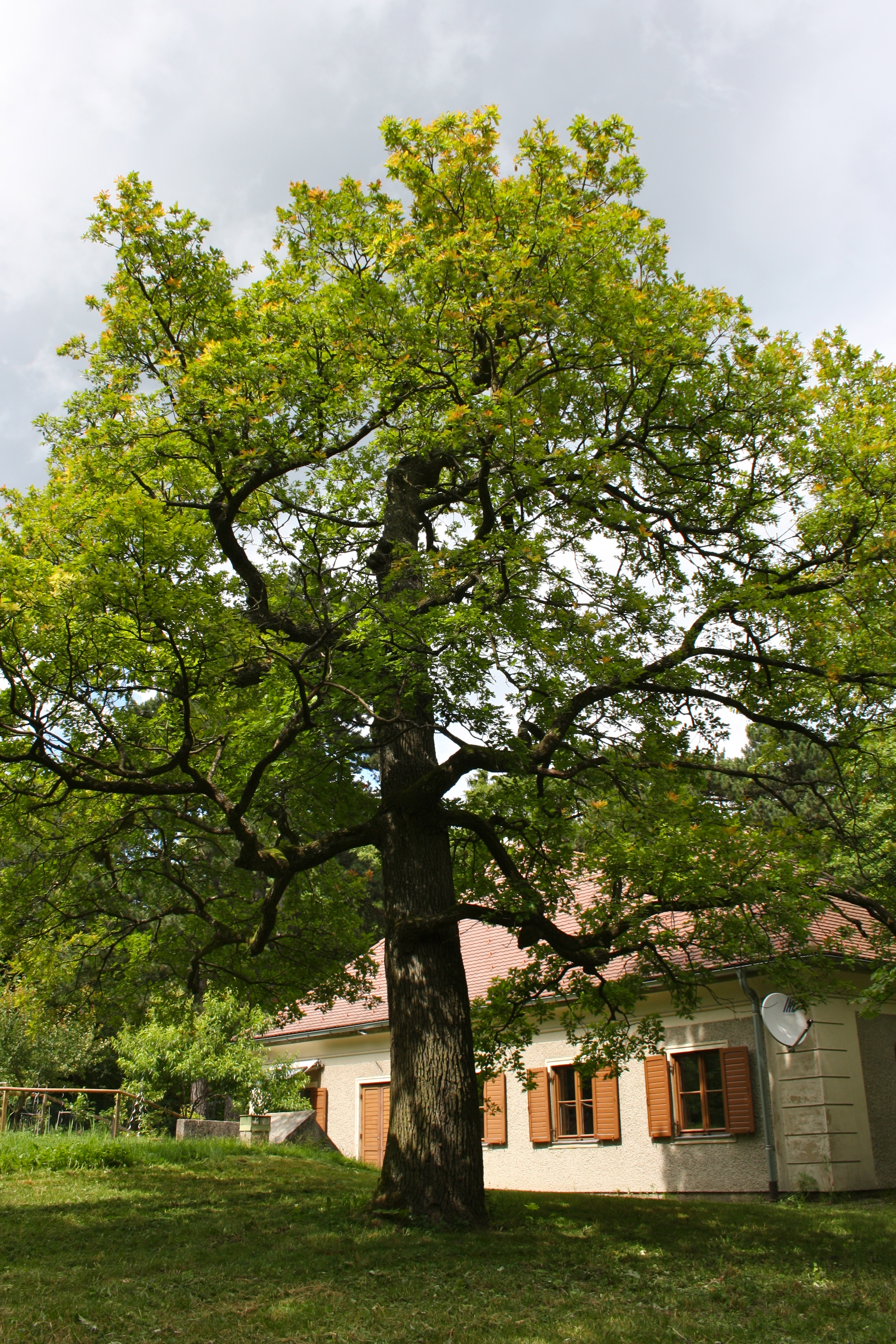 Waldbestand beim Rasthaus Schießstätte in Wien-Mauer. This media shows the natural monument in Vienna with the ID 535.